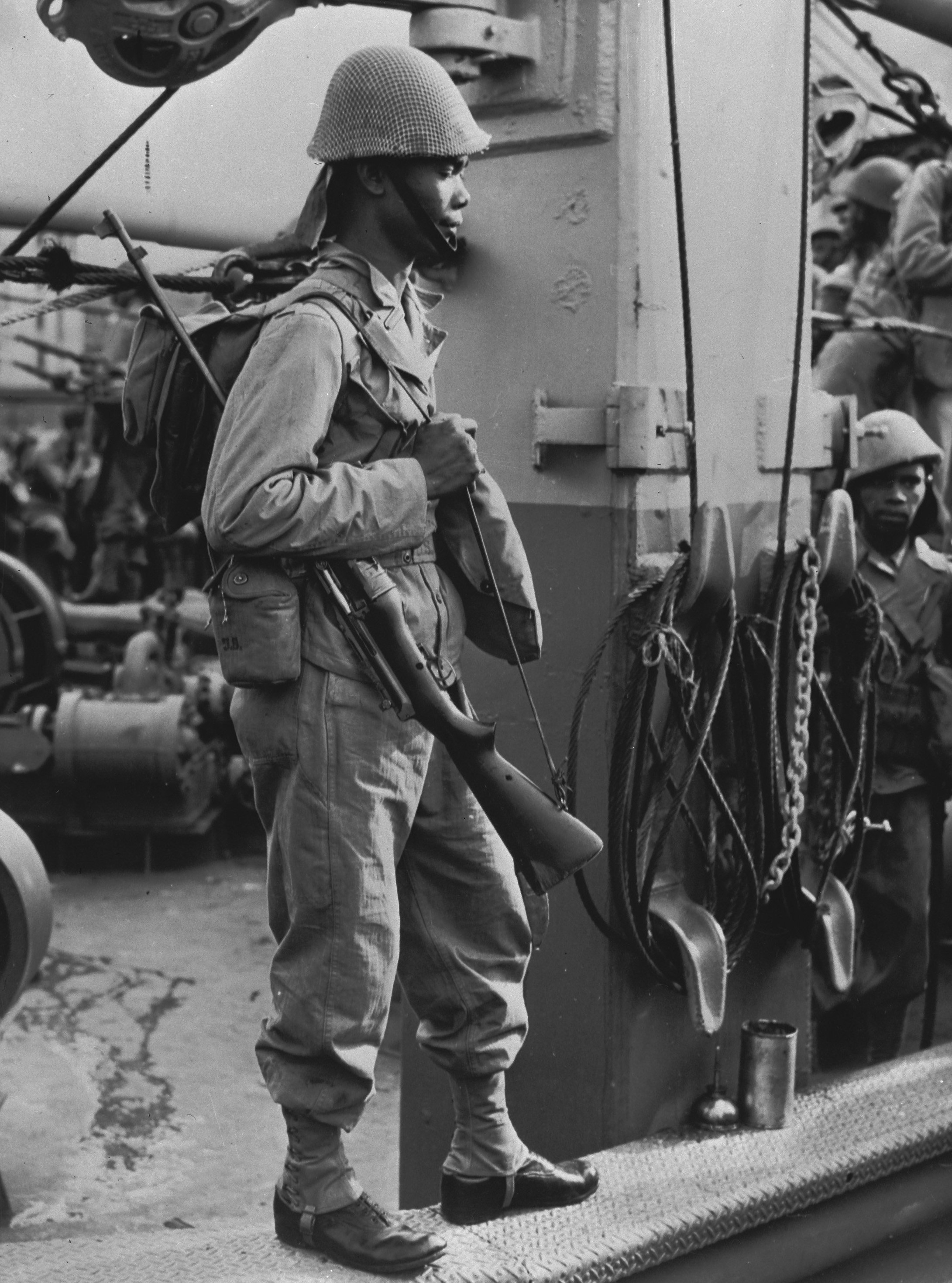 Collectie / Archief : Fotocollectie Anefo Reportage / Serie : [ onbekend ] Beschrijving : Koninklijk Nederlands Indisch Leger (KNIL), Australië. Vanuit Suriname arriveren Nederlanders, Caribische Indianen, Creolen, samen met Javanen en Hindoestanen. Het contingent wordt genoemd: West-Indische strijdkrachten van het KNIL Datum : 1944 Locatie : Australië Trefwoorden : leger, soldaten, tweede wereldoorlog Fotograaf : Onbekend / Publiek Domein, [onbekend] Auteursrechthebbende : Nationaal Archief Materiaalsoort : Negatief (zwart/wit) Nummer archiefinventaris : bekijk toegang 2.24.01.04 Bestanddeelnummer : 934-9002